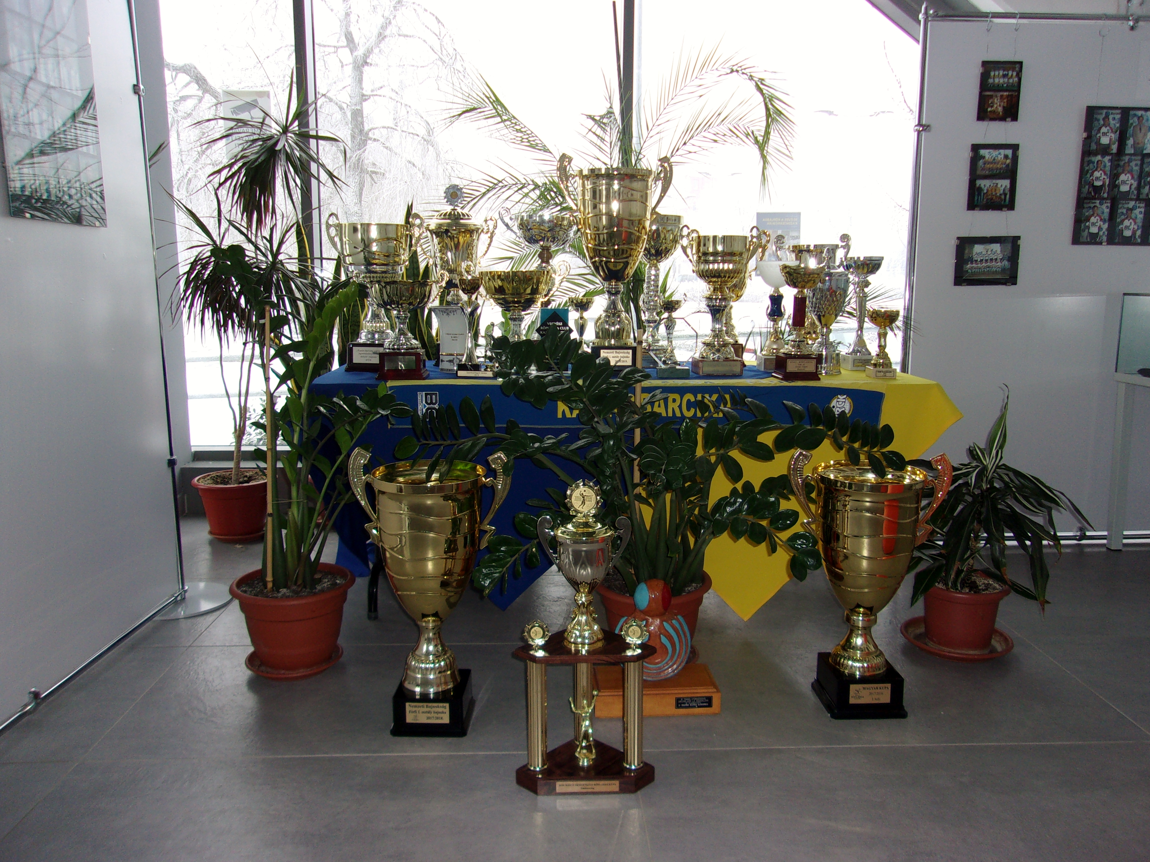 50 éves a Vegyész Röplabda Club Kazincbarcika - emlékkiállítás